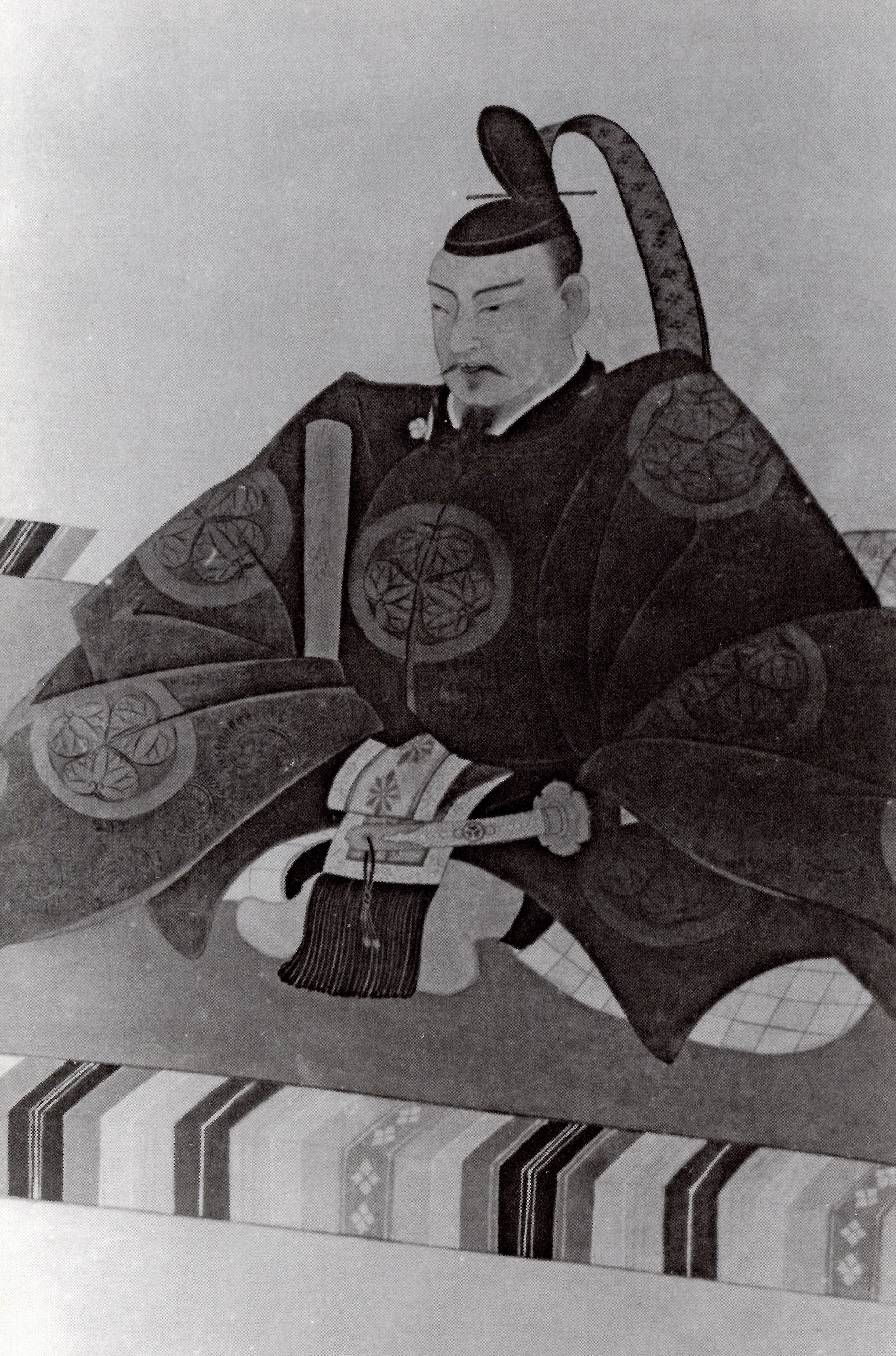 徳川頼房の肖像。